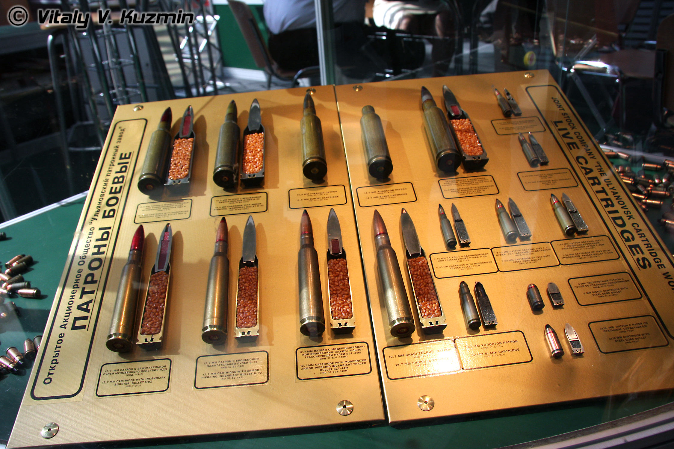 Патроны Ульяновского патронного завода